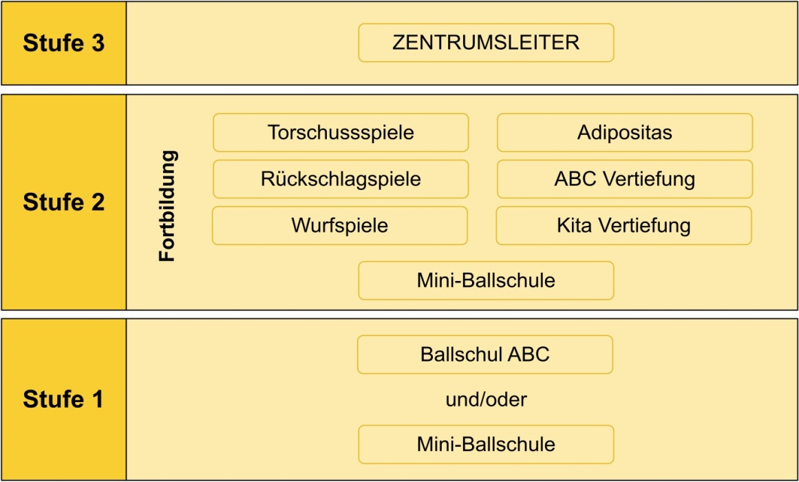 Das Ausbildungssystem der Ballschule Heidleberg